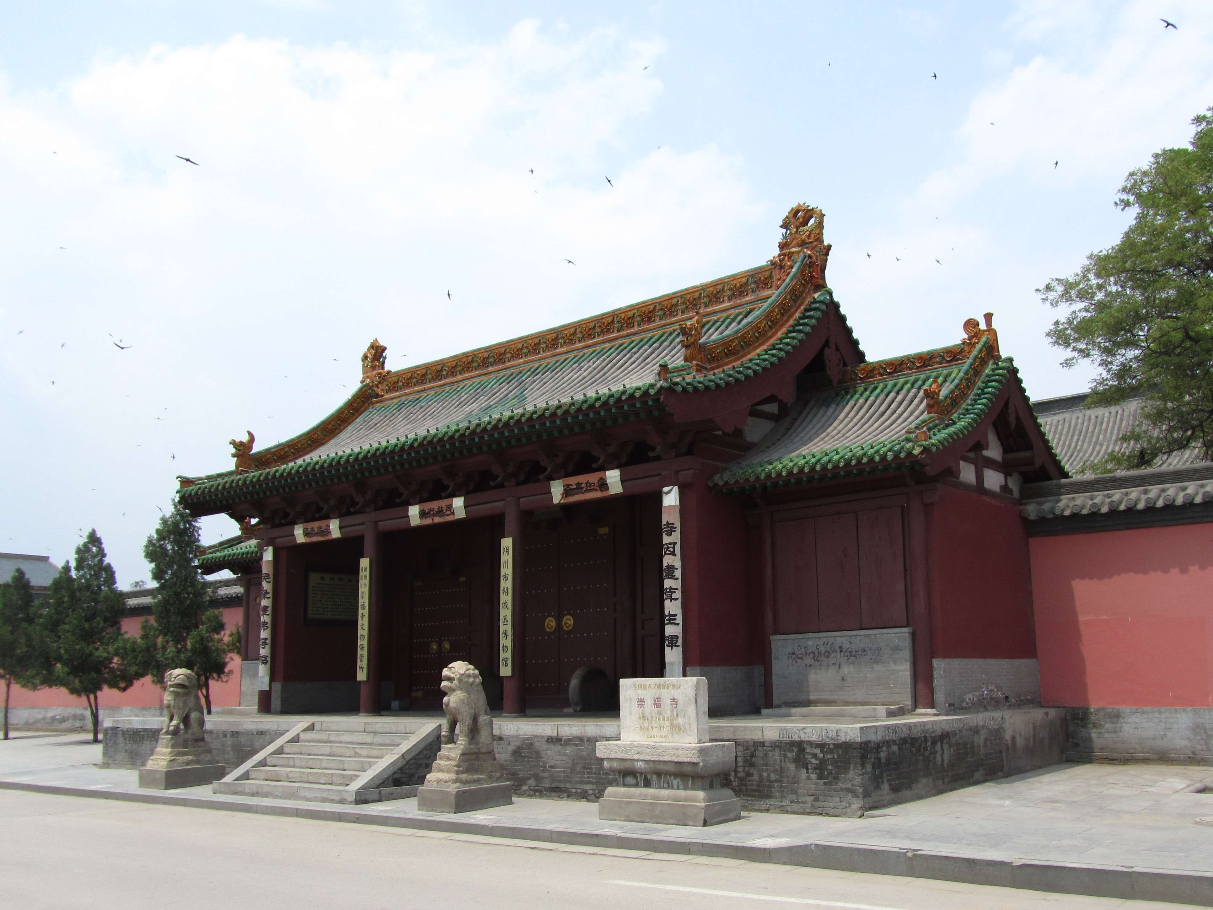 朔州崇福寺山门。